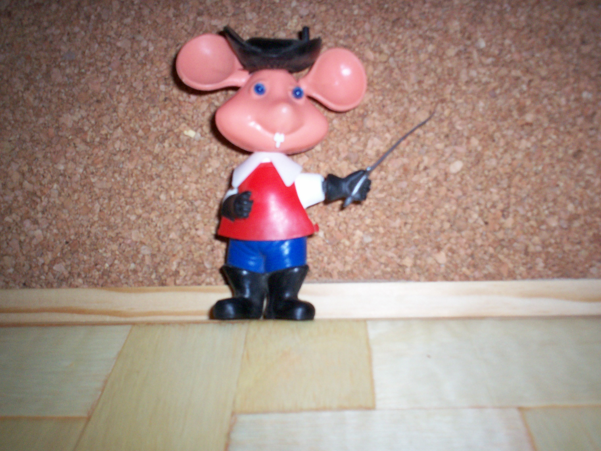 Topo gigio moschettiere